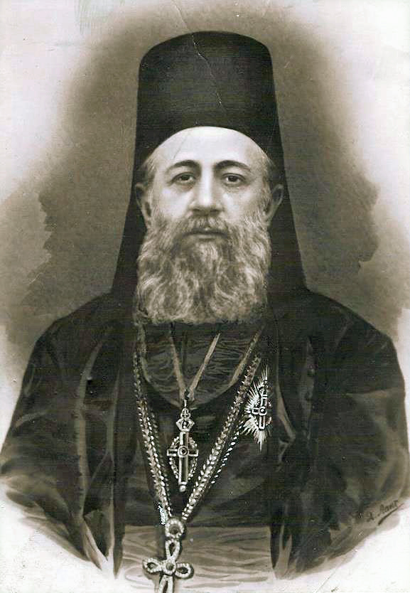 Епископ Георгий (Летич)